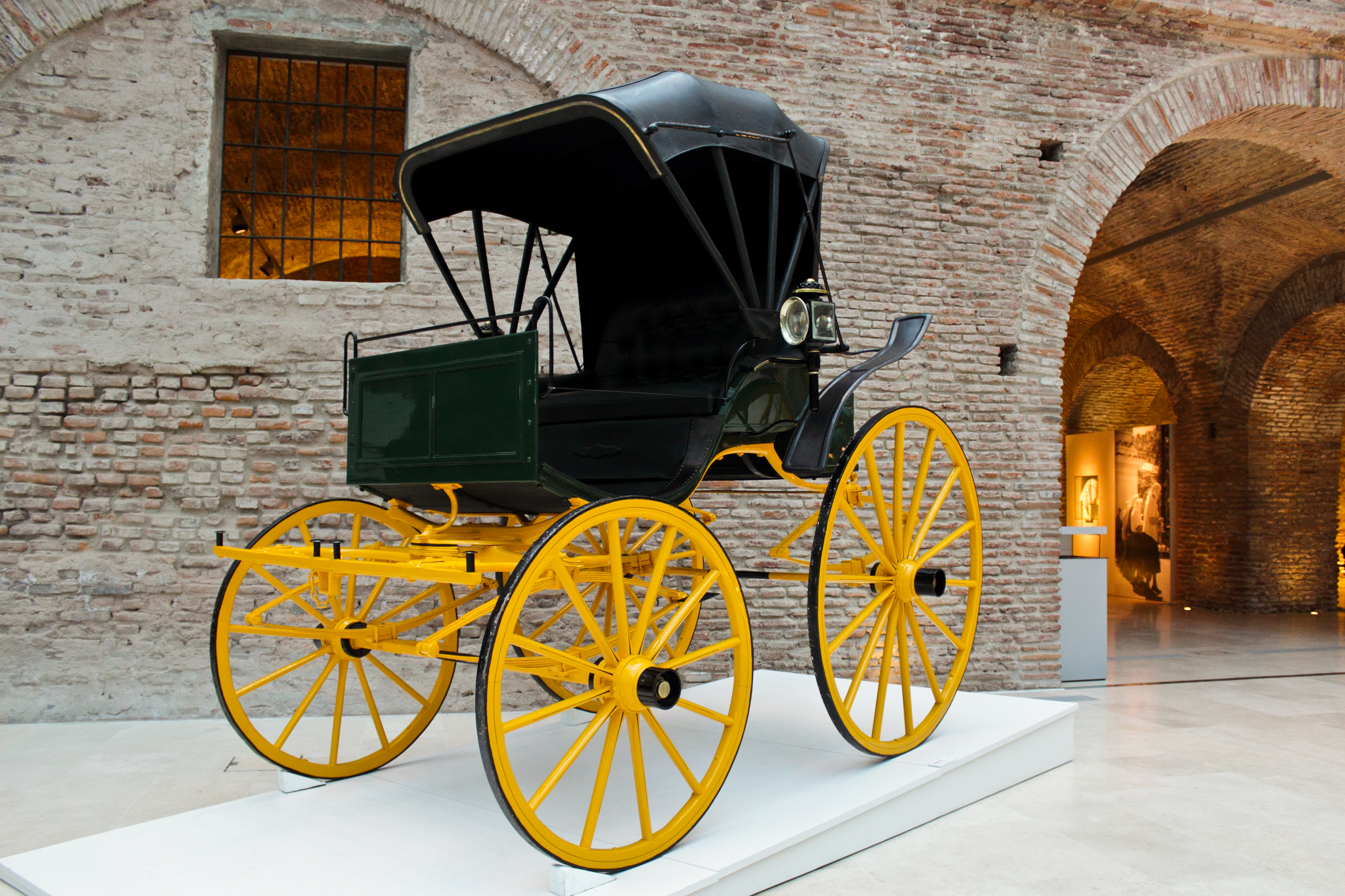 Carruaje Phaeton de origen estadounidense (ca. 1890), de uso particular del Presidente Hipólito Yrigoyen. Por lo general, el bastidor metálico era importado de los Estados Unidos y la parte de madera se confeccionaba en Argentina de manera artesanal. Es un típico coche campestre, de carrocería liviana y grandes ruedas y suspensión robusta, que le otorgaba un buen desempeño en los caminos de entonces. No es un vehículo confortable pensado para largos viajes, ofrece la mínima protección de una capota plegable, pensada principalmente para protegerse del sol. En la parte posterior lleva una caja que servía para guardar algunos objetos de regular tamaño.